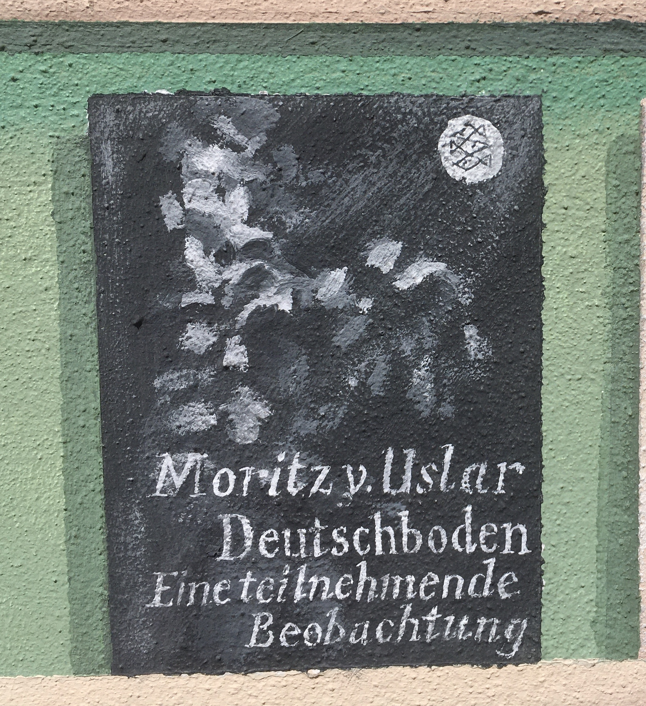 Wandmalerei mit Buchcover "Deutschboden" von Moritz von Uslar, Zehdenick